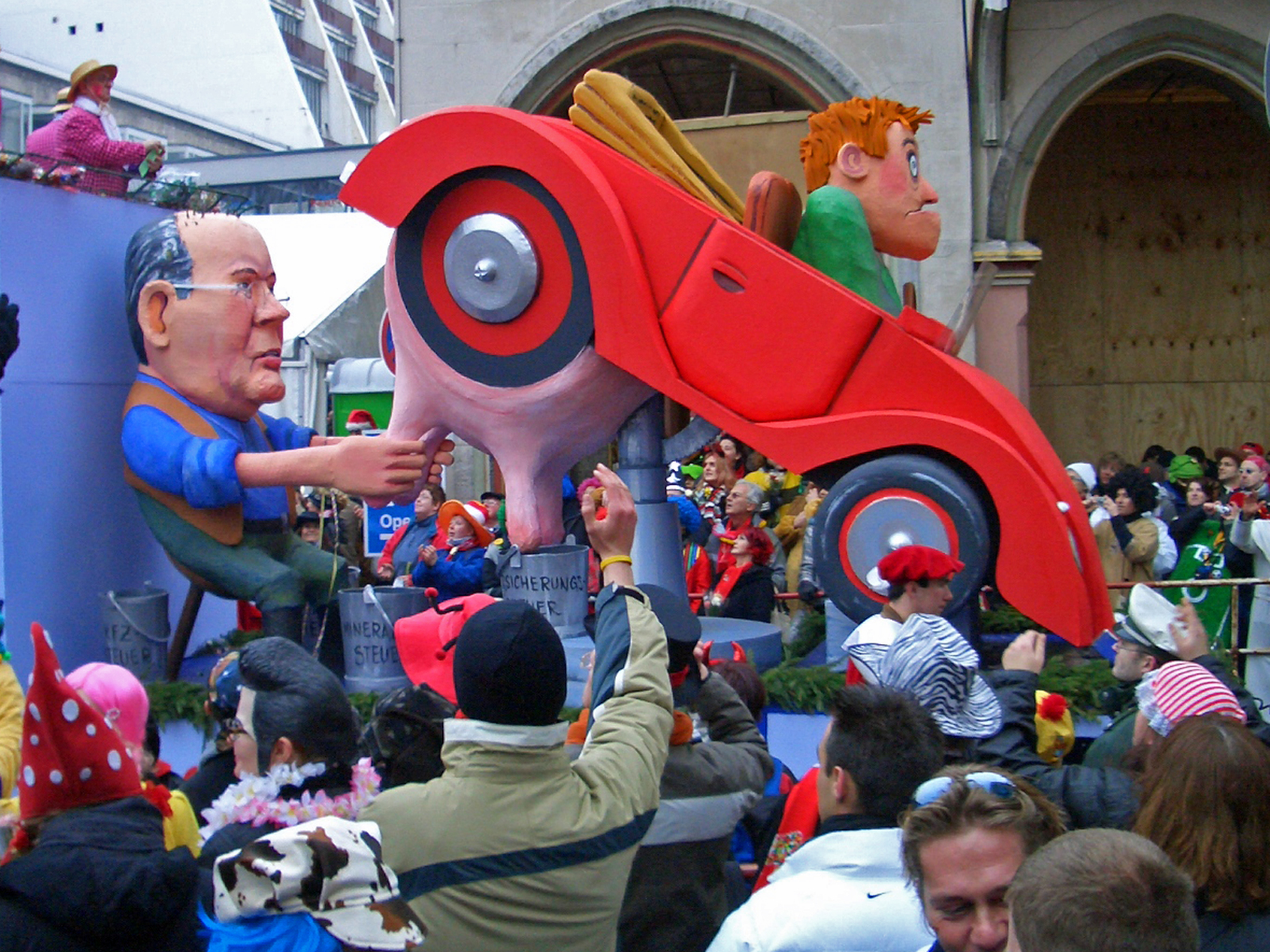 Wagen "Autofahrer wird gemolken", Rosenmontagszug 2006